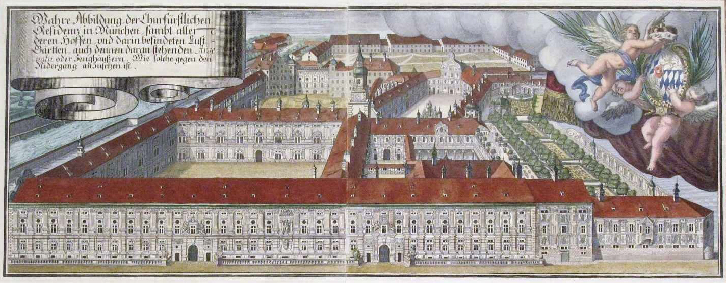 "Wahre Abbildung der Churfürstlichen Residenz in München sambt allen deren Höffen und darin befindeten Lust-Gärtten ...", Kupferstich, nachkoloriert, 28 x 60 cm